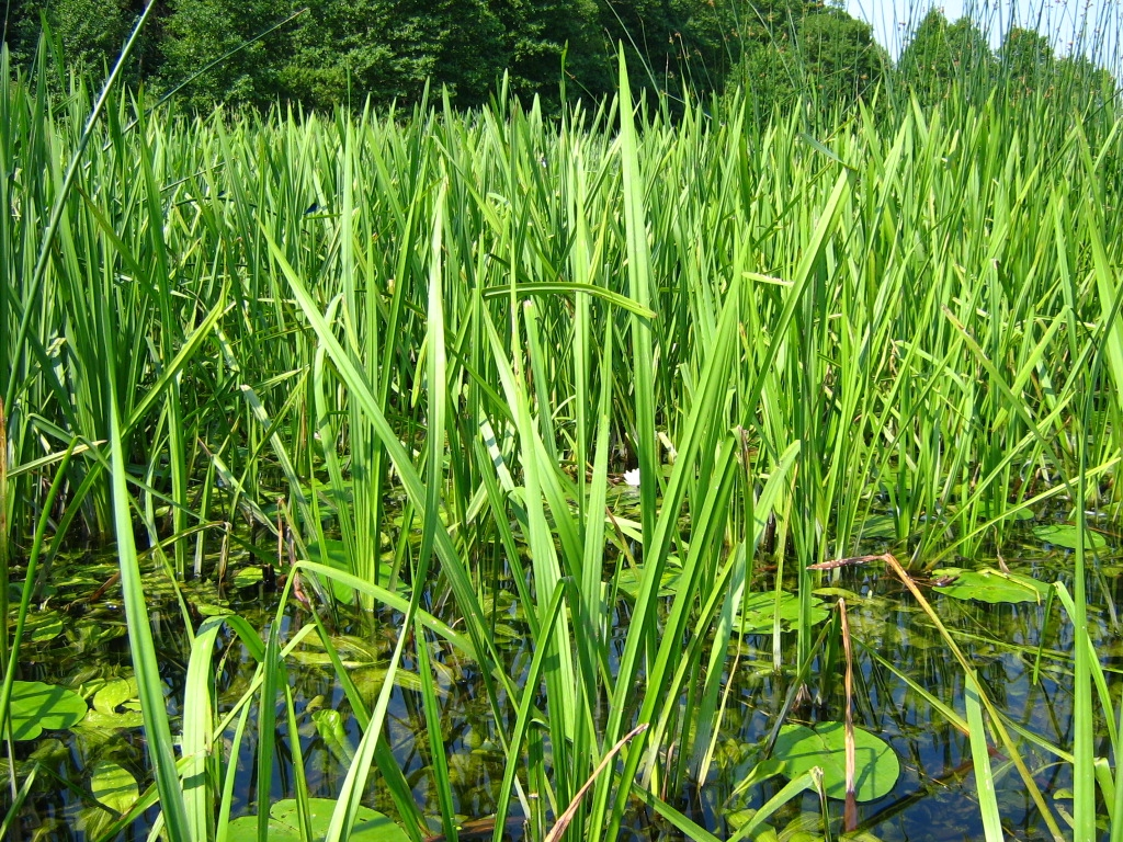 Sparganietum erecti